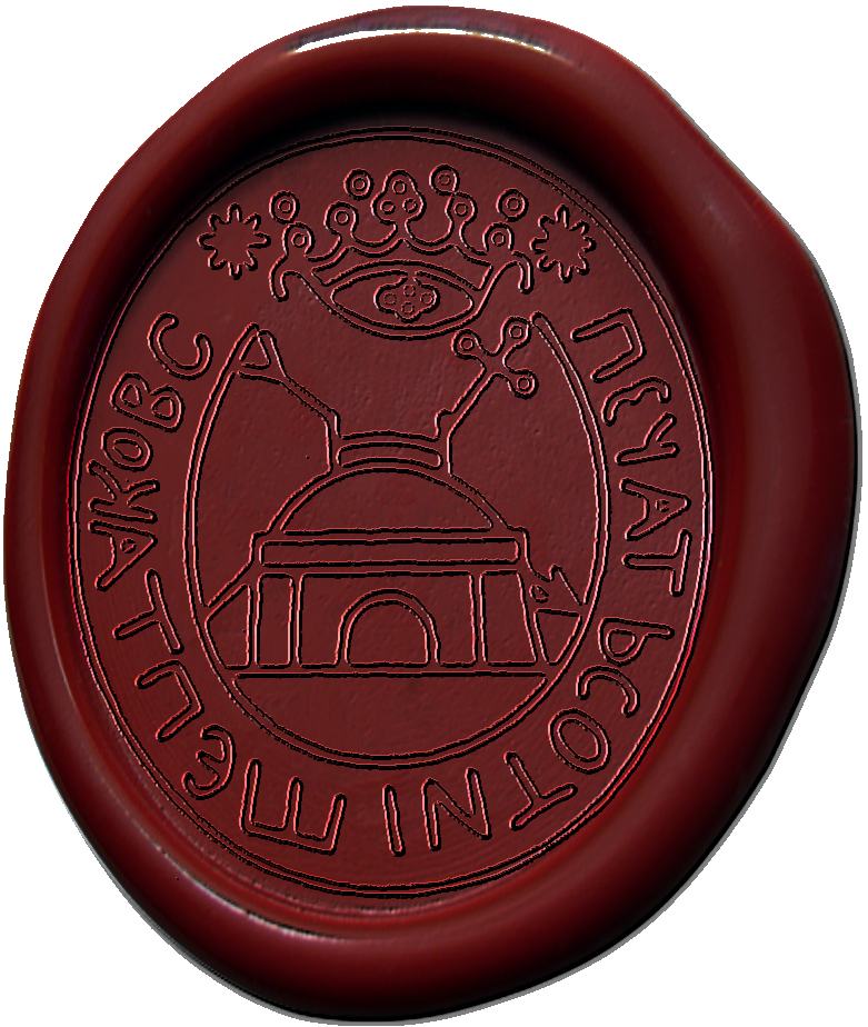 З печатки від 1775 р.